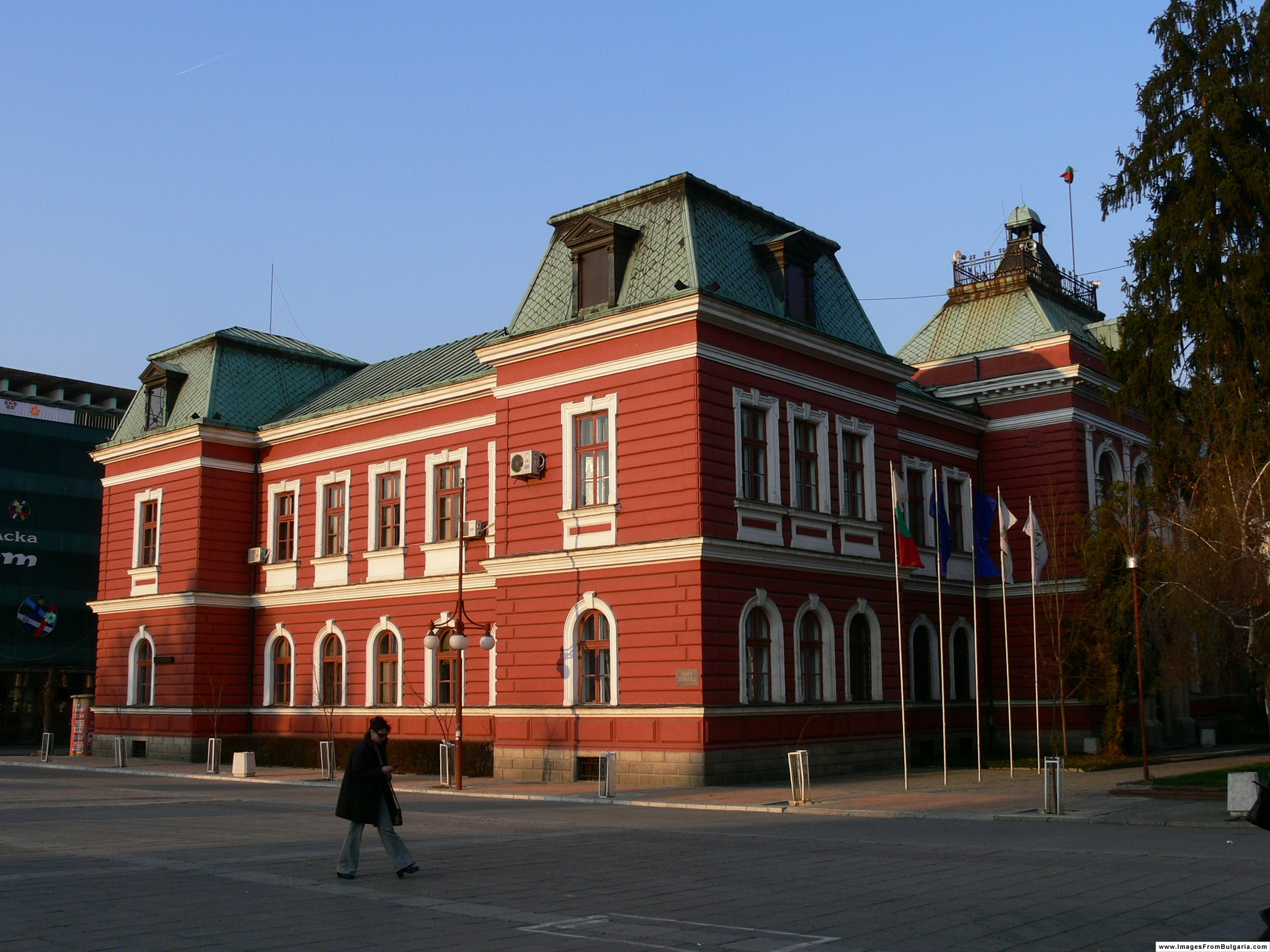 Kyustendil, Bulgaria